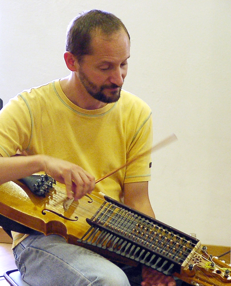 Der Musiker Marco Ambrosini mit der Nyckelharpa